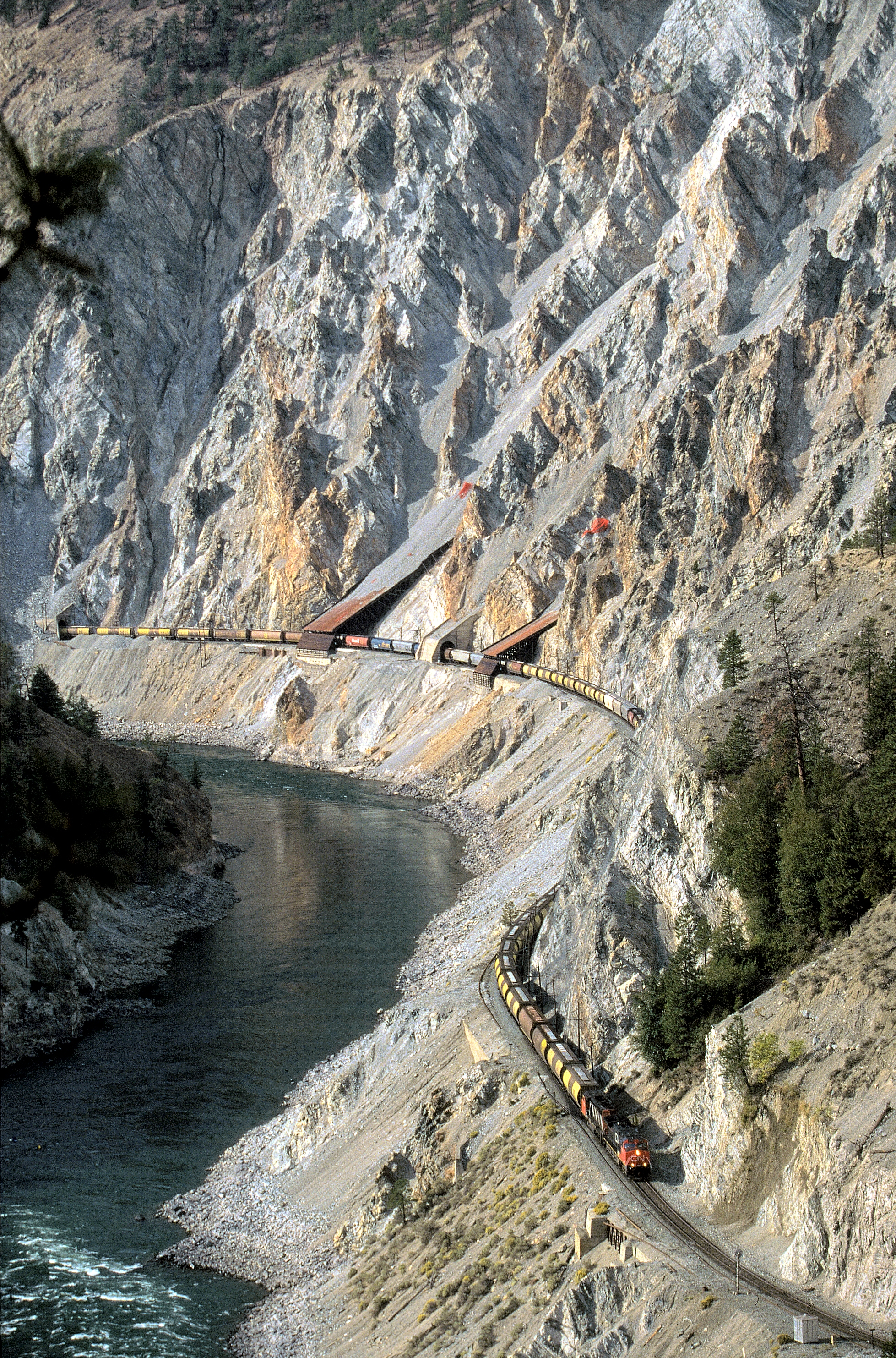 Mit über hundert Waggons schlängelt sich dieser Güterzug am North-Thompson-River entlang. Insgesamt verliehen fünf Dieselloks dem Zug seine Power, trotzdem bewegt sich der Zug im Schneckentempo. Fotografiert mit Canon EOS 5 u. Canon Objektiv 70-200 (in 200mm Stellung) Belichtung 1/250sek Digitalisiert mit Kodak-Photo-CD, EBV mit PSP 5